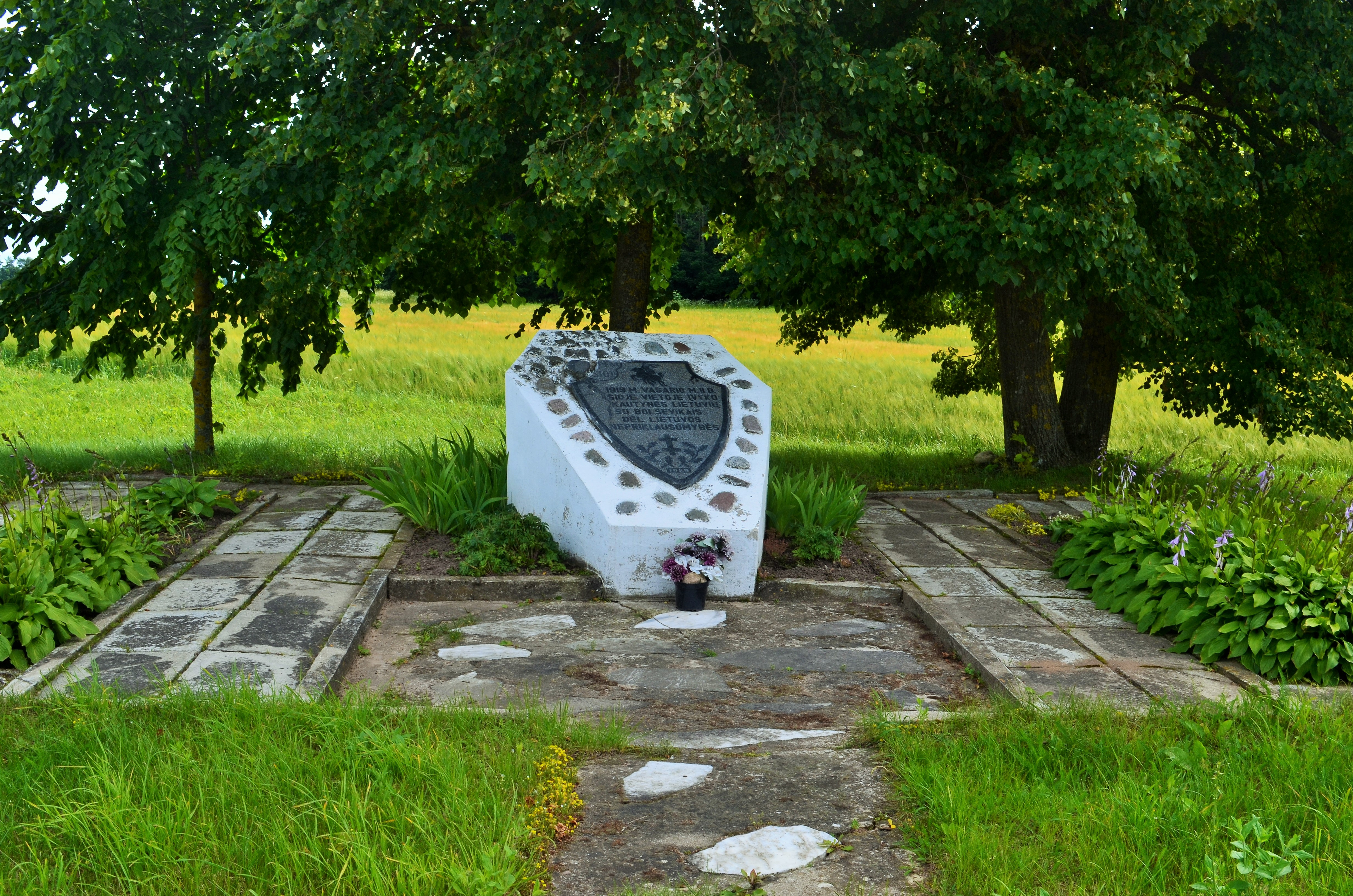 Paminklas atminti 1919 m. lietuvių-bolševikų kautynėms, Mitėniškiai, Kėdainių raj.